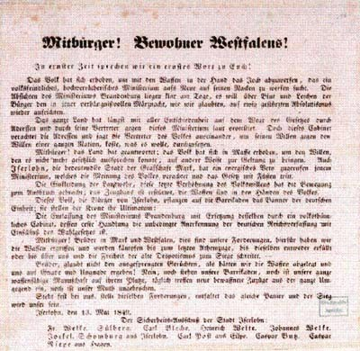 Aufruf der Iserlohner Aufständischen 1849